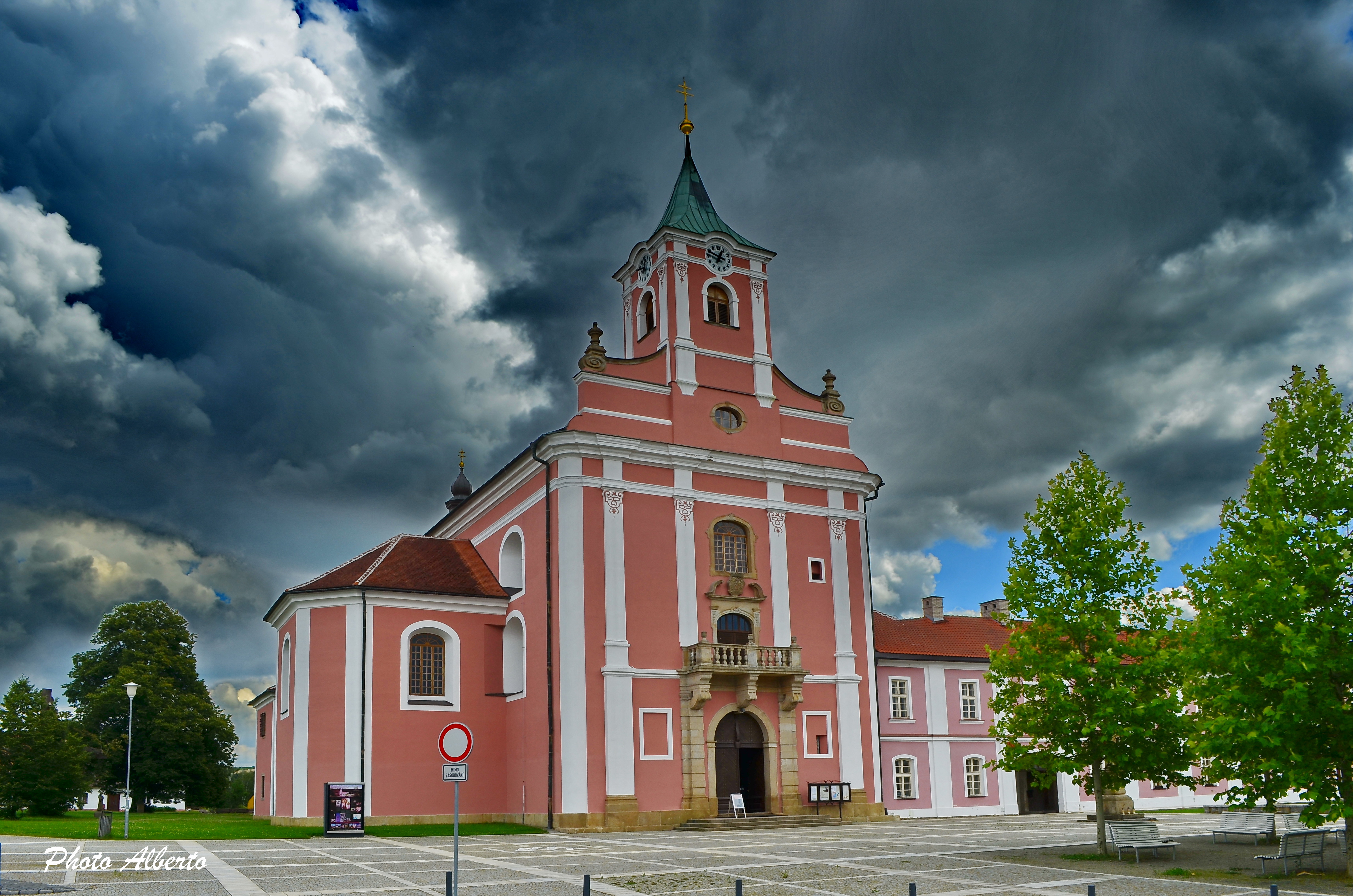 Poutní chrám Narození Panny Marie Štípa (Zlín), Česká republika. Foto Nikon D5100, 17. července 2020